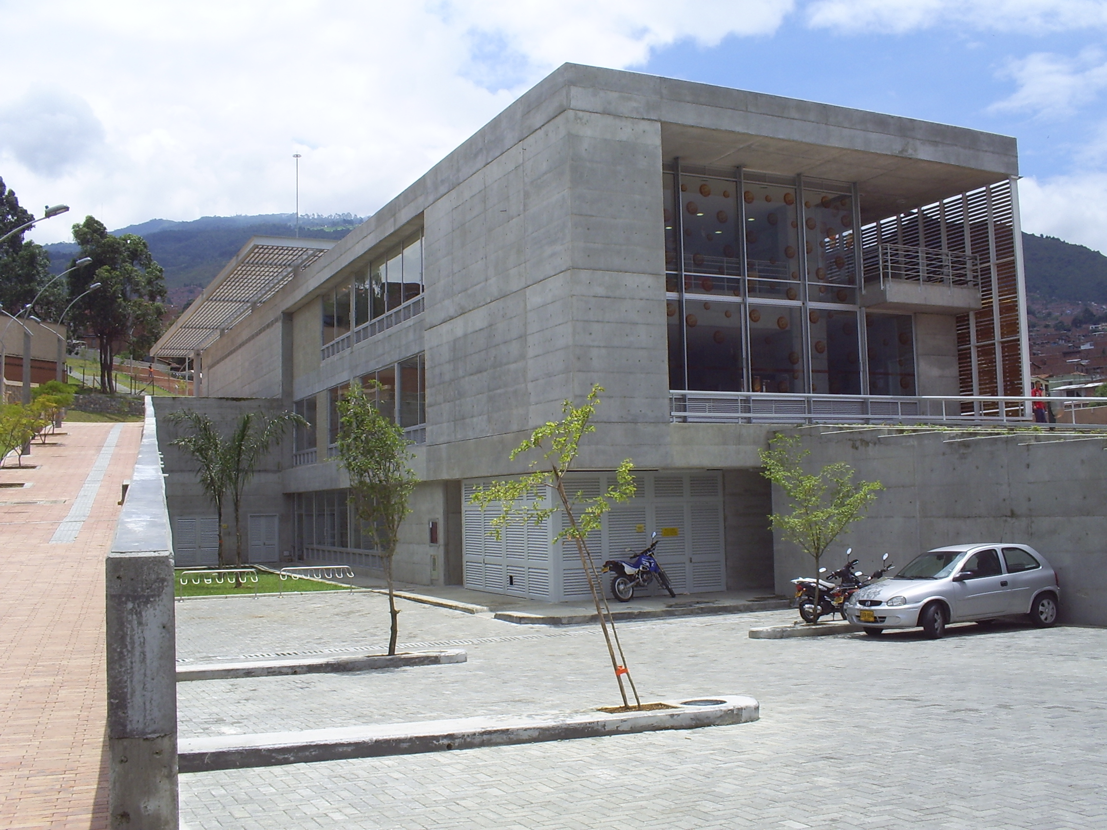 Biblioteca Tomás Carrasquilla, Medellín, Colombia